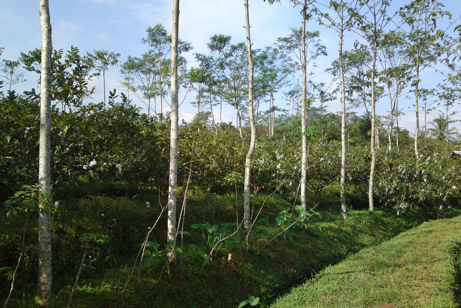 foto kebun jambu biji merah di dusun Lekor desa Gondoharum kec. pageruyung kab. Kendal